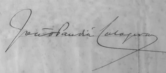 Assinatura de João Pandiá Calógeras como titular do antigo cargo de ministro da Guerra do Brasil.